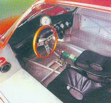 Bandini sport coupè 1000 "saloncino" 1968